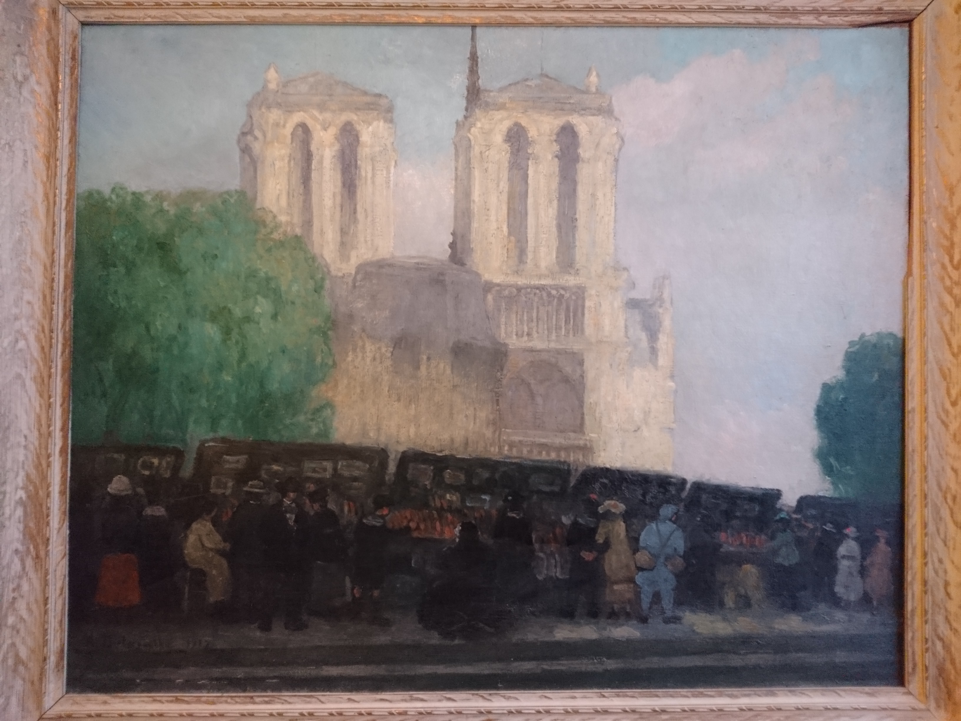 Quai des Grands Augustins par Angele Delasalle